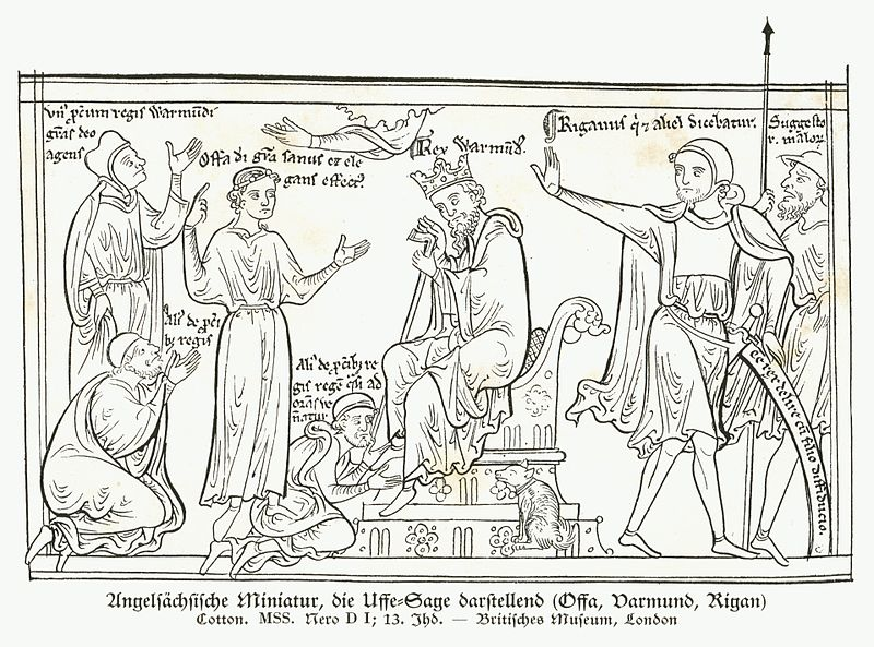 Angelsächsische Miniatur, die Uffe-Sage darstellend (Offa, Varmund, Rigan); Cotton. MMS. Nero D I; 13. Jahrhundert - Britisches Museum, London